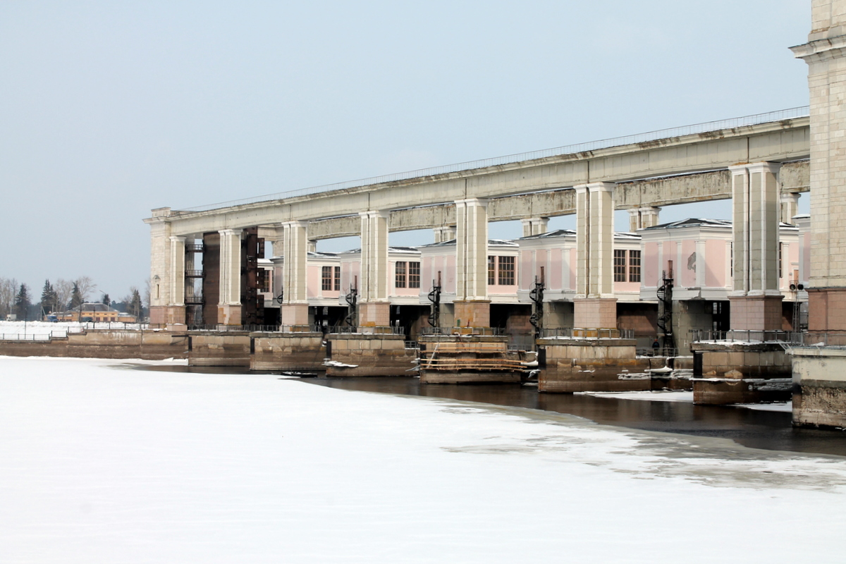 Водосбросная плотина Угличской ГЭС